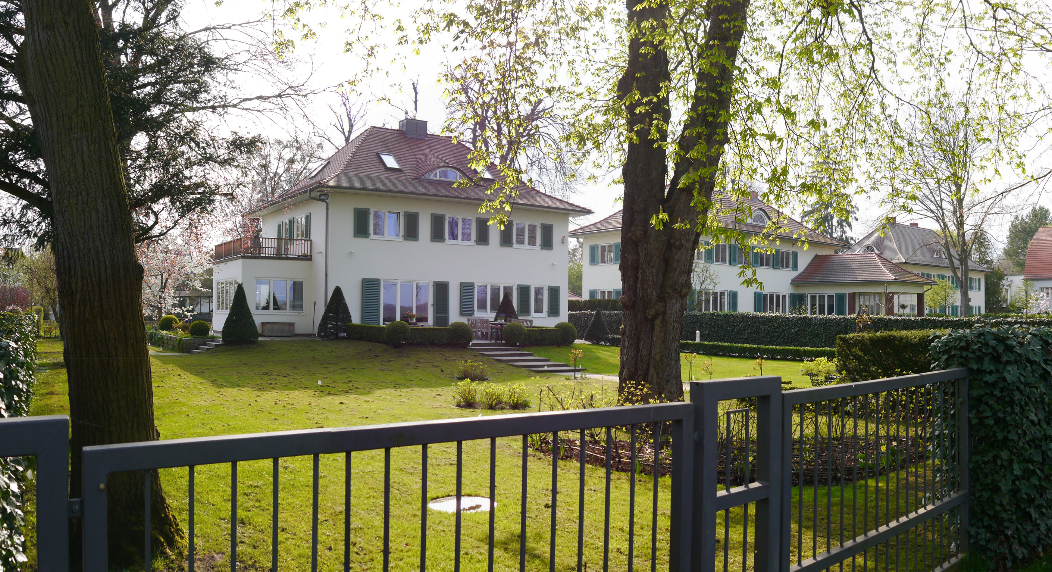 Baudenkmal: Schwanenallee 4+5+5a, Potsdam, Landhausgruppe, Architekt: Otto von Estorff